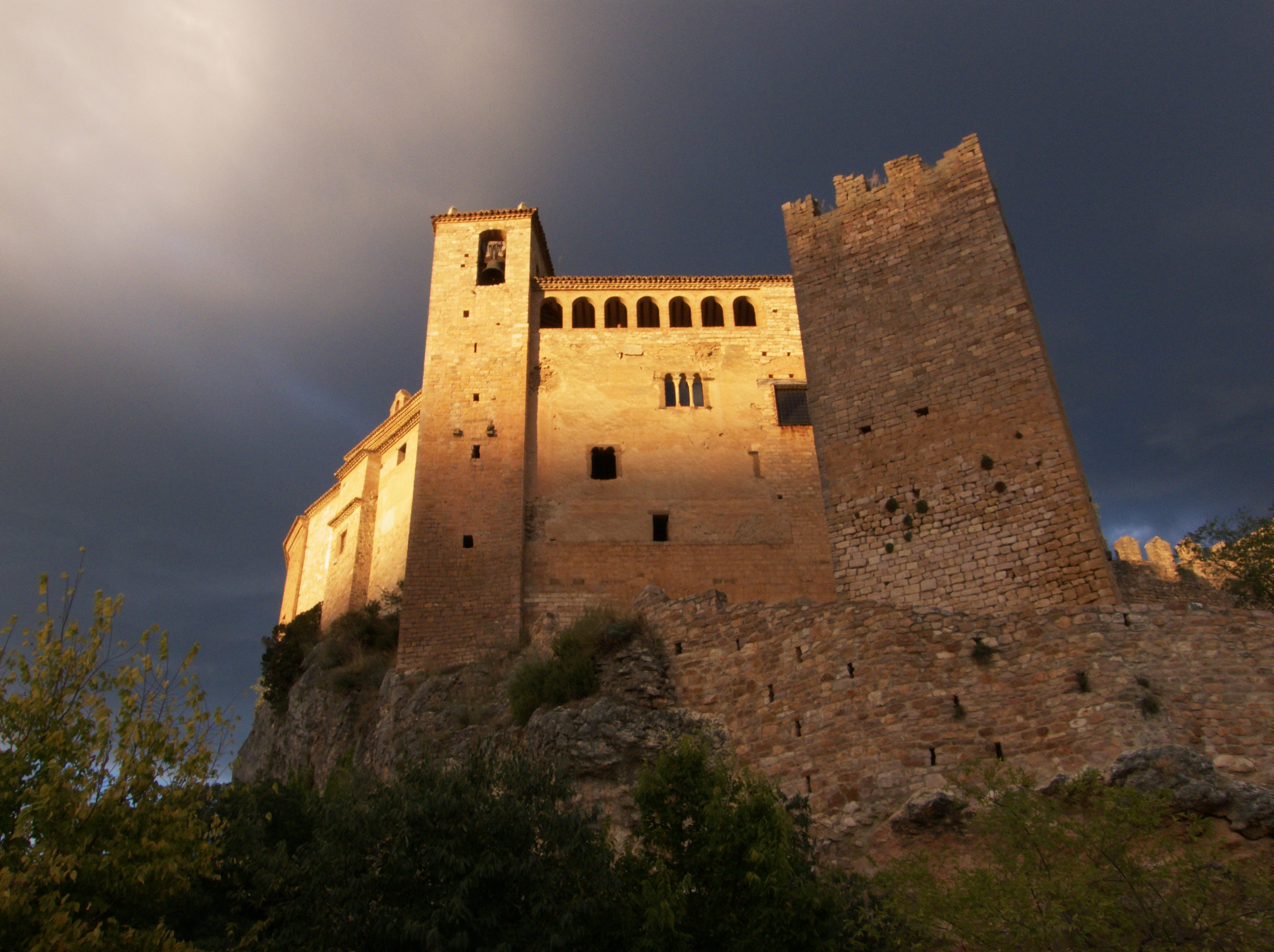 Castillo de Alquézar visto desde las calles de la villa